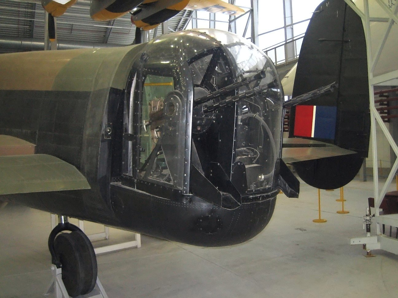 Avro Lancaster tail turret